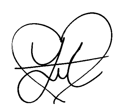 三上悠亜署名